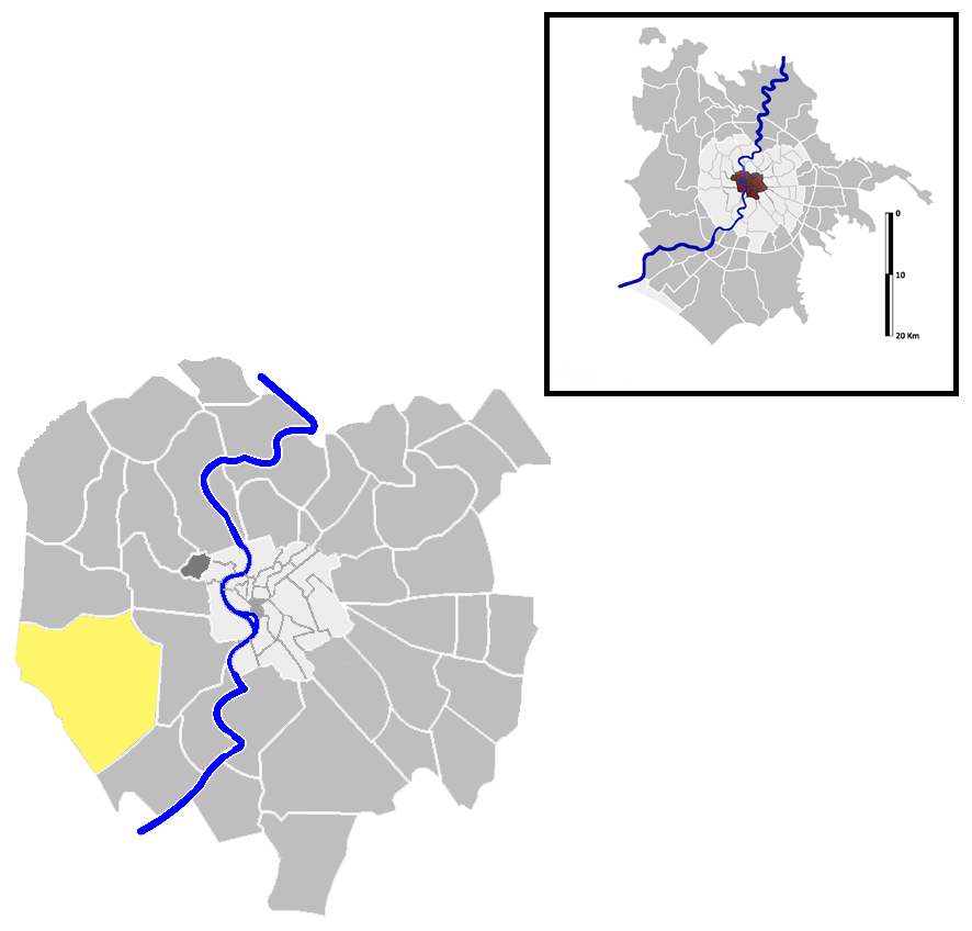 Gianicolense